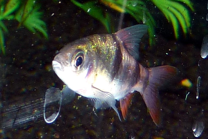 Dunckers Barbe (Puntius dunckeri), als "Clownbarbe (P. everetti)" im Aquaristikfachhandel.